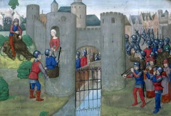 La prostituée Rahab fait évader les deux espions de Josué (cf. le Livre de Josué, chapitre 2). Miniature extraite des Antiquités judaïques de Flavius Josèphe, traduction anonyme.